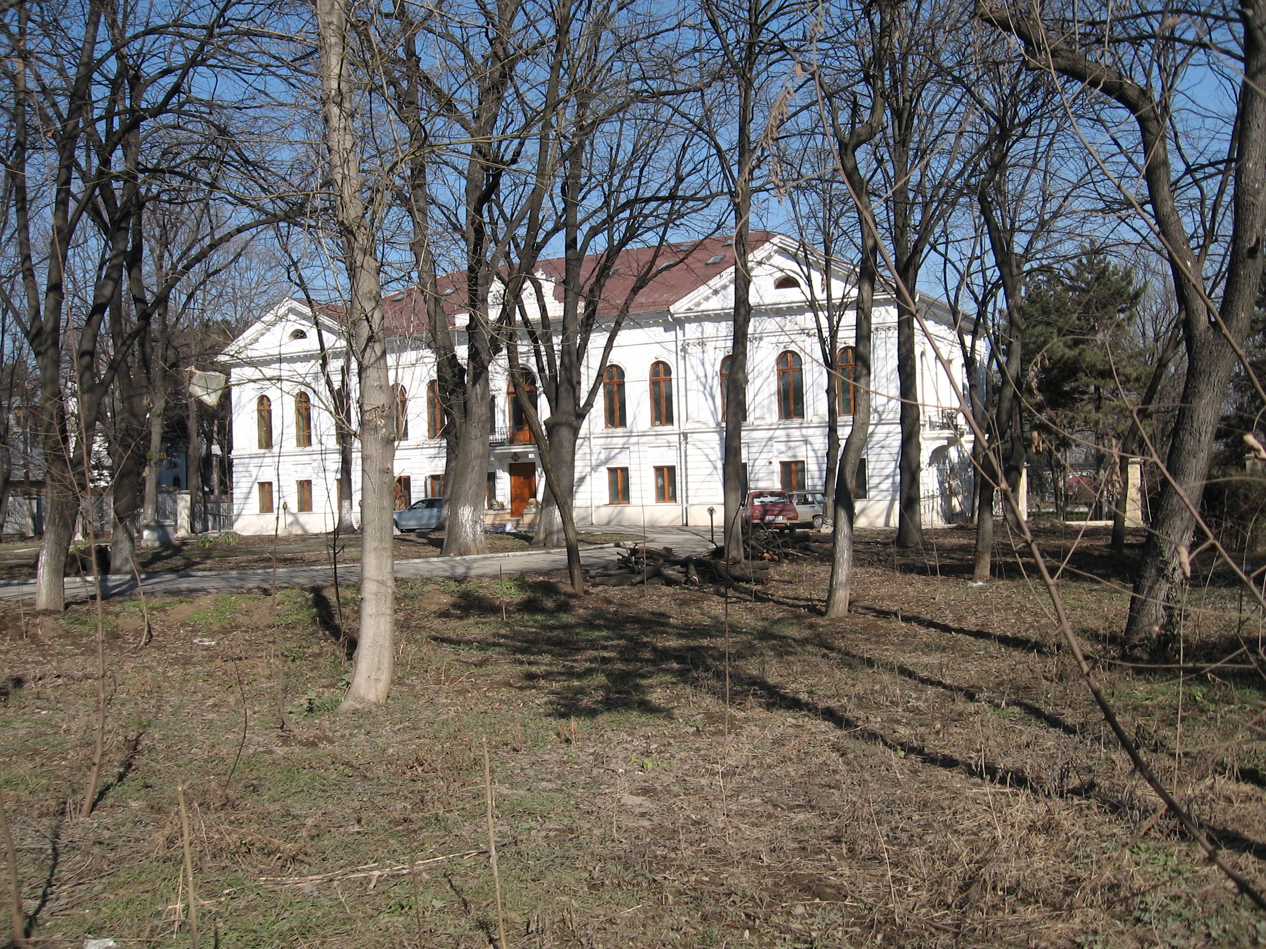 Palatul Ghica, Bucuresti (construit in 1822)